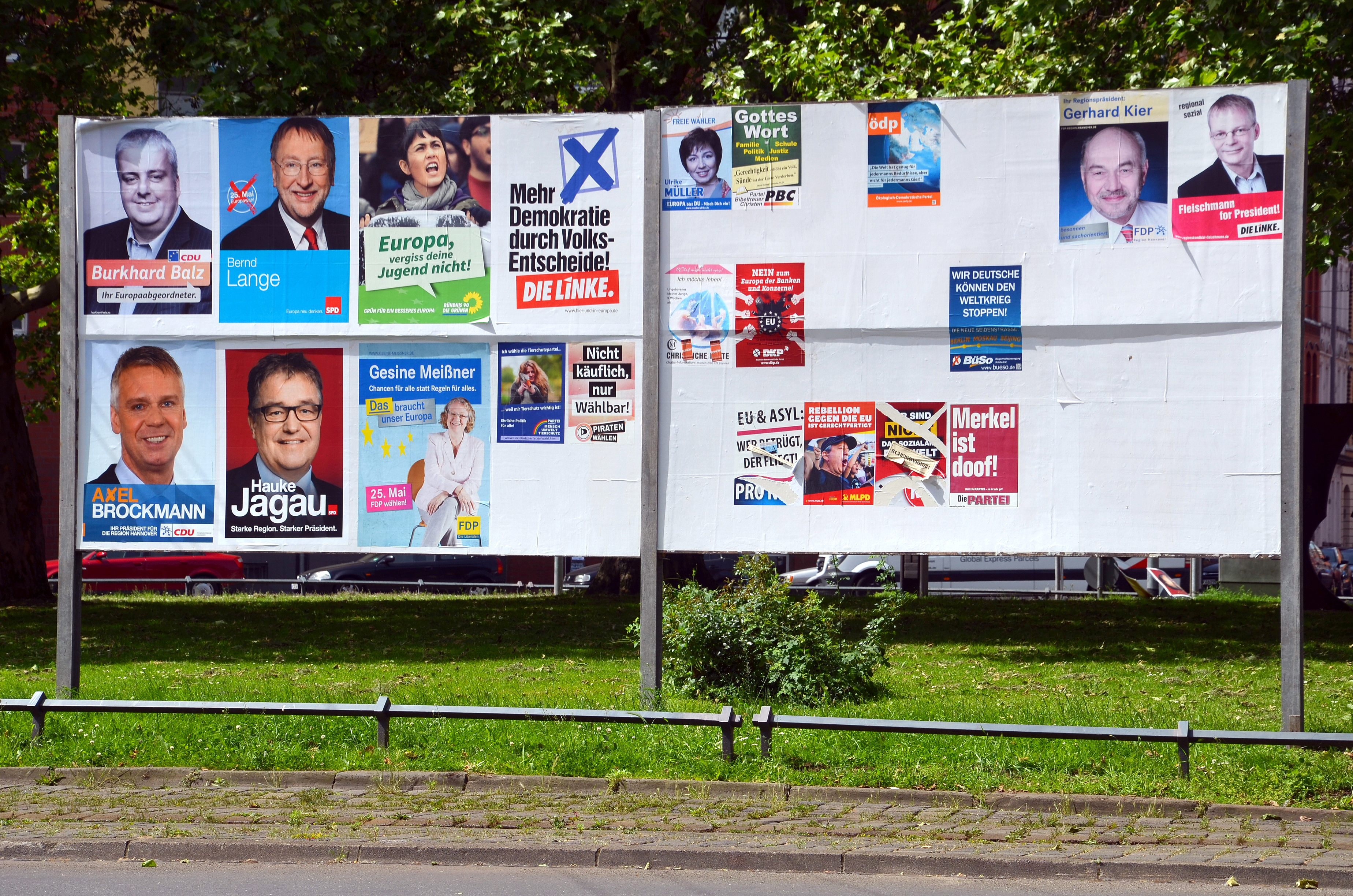 Stellwand am Goetheplatz in Hannover mit Wahlplakaten der Parteien zur Europawahl 2014 sowie zur Wahl des Regionspräsidenten mit den Porträts etwa von Axel Brockmann und des Amtsinhabers Hauke Jagau ...